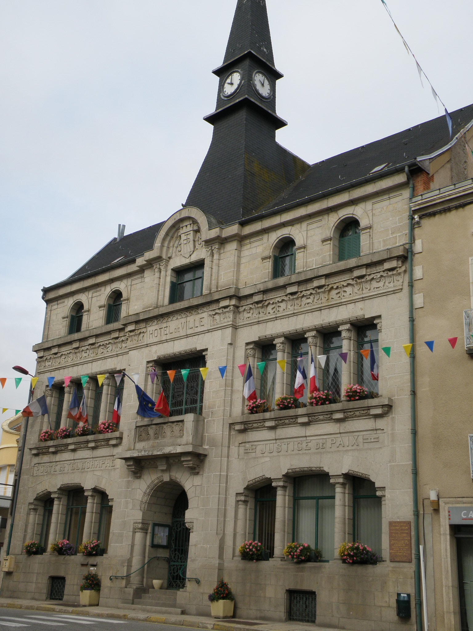 Craponne-sur-Arzon, dép. Haute-Loire, France. Hôtel de ville.